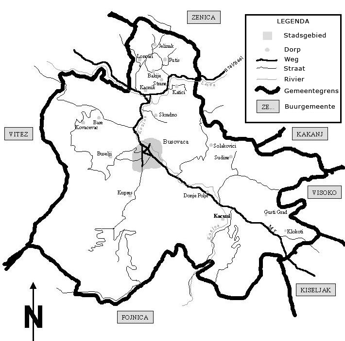 Zelf gemaakt met een tekenprogramma!